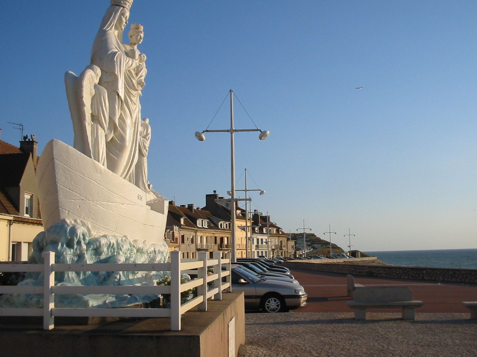 Statue de Notre Dame de Boulogne située Quai de la Vierge à Le Portel Plage